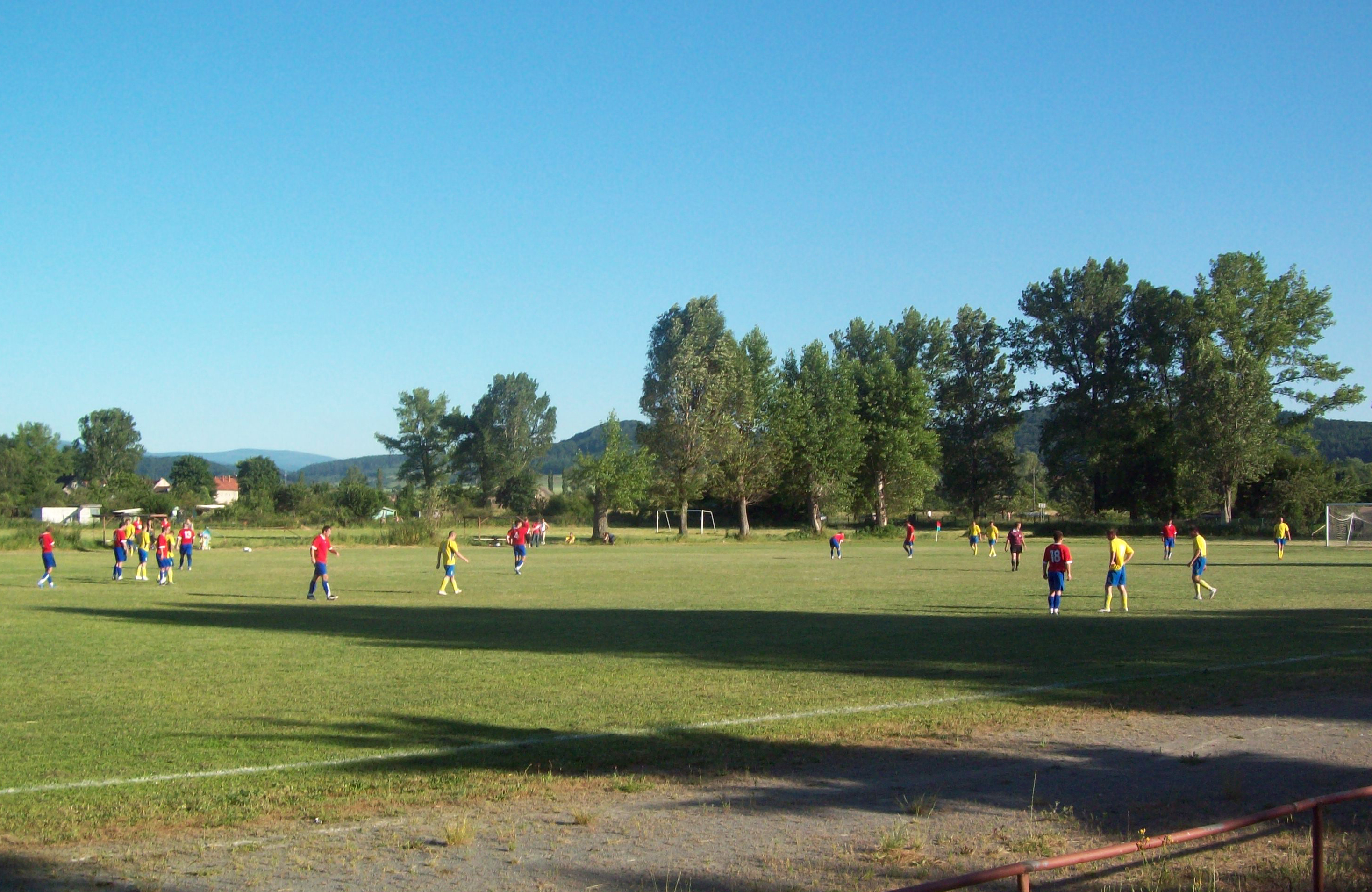 Boisko sportowe w Krosnowicach, mecz Orlęta Krosnowice z Zamkiem Trzebieszowice